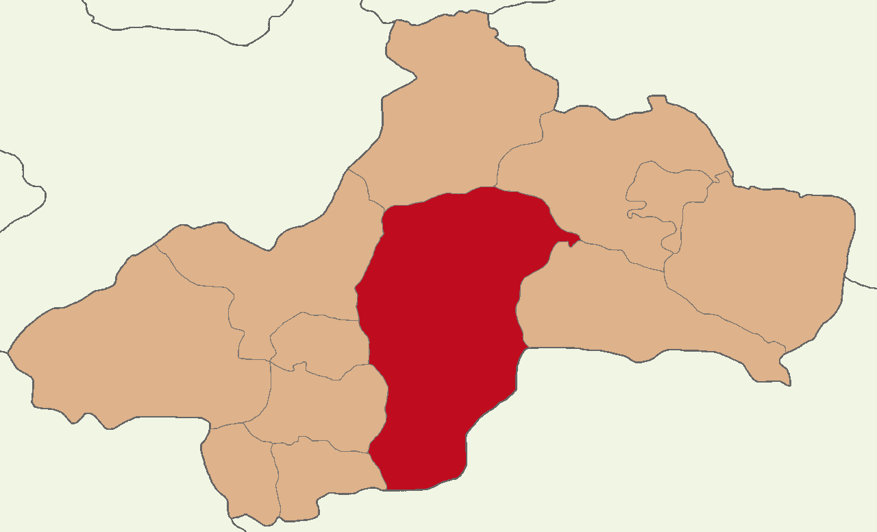 Tokat Merkez ilçesinin konumu